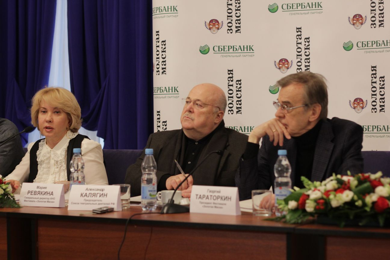 Maria Revyakina, Kalyagin, Taratorkin